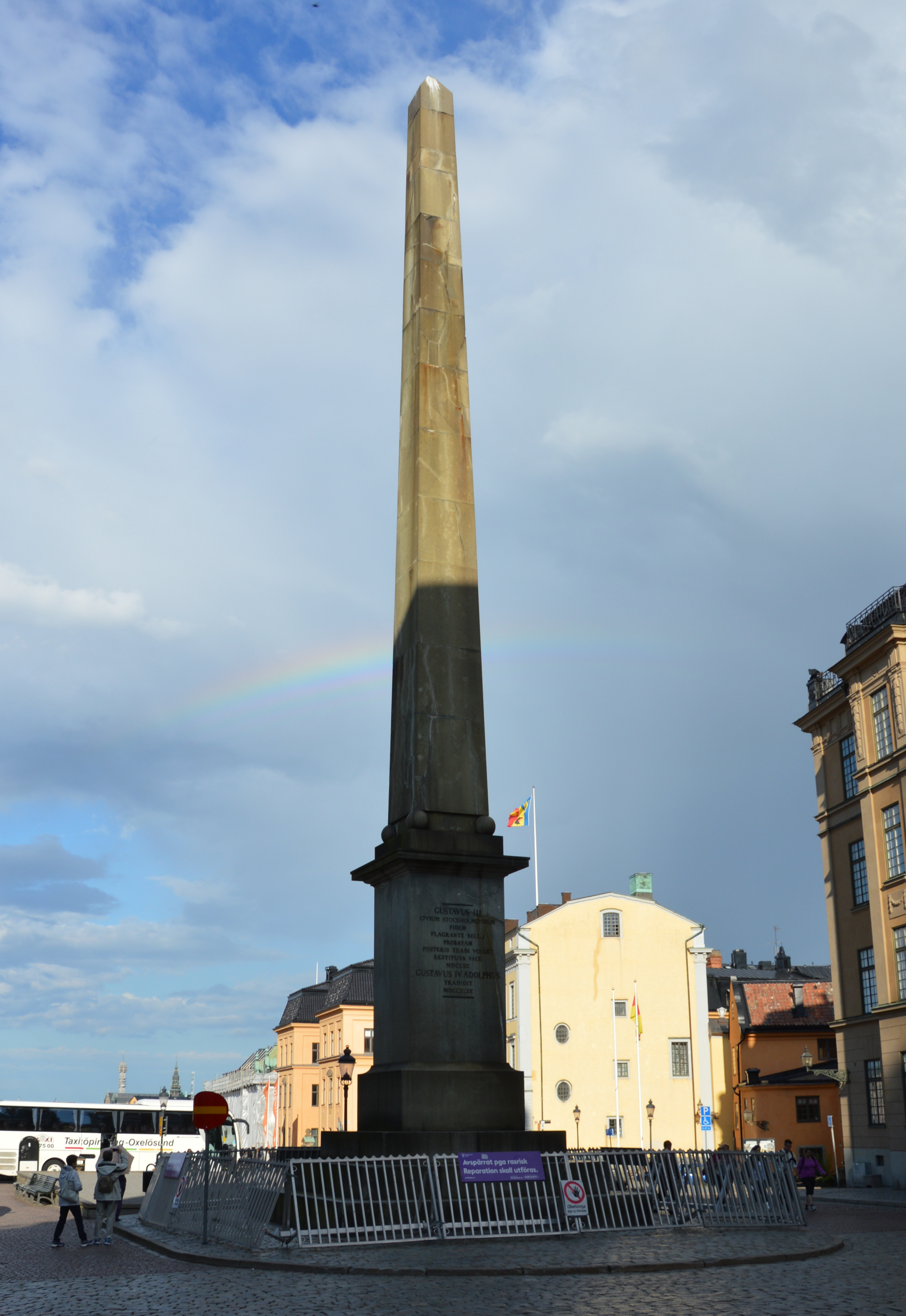 Obelisk in Stockholm am Slottsbacken